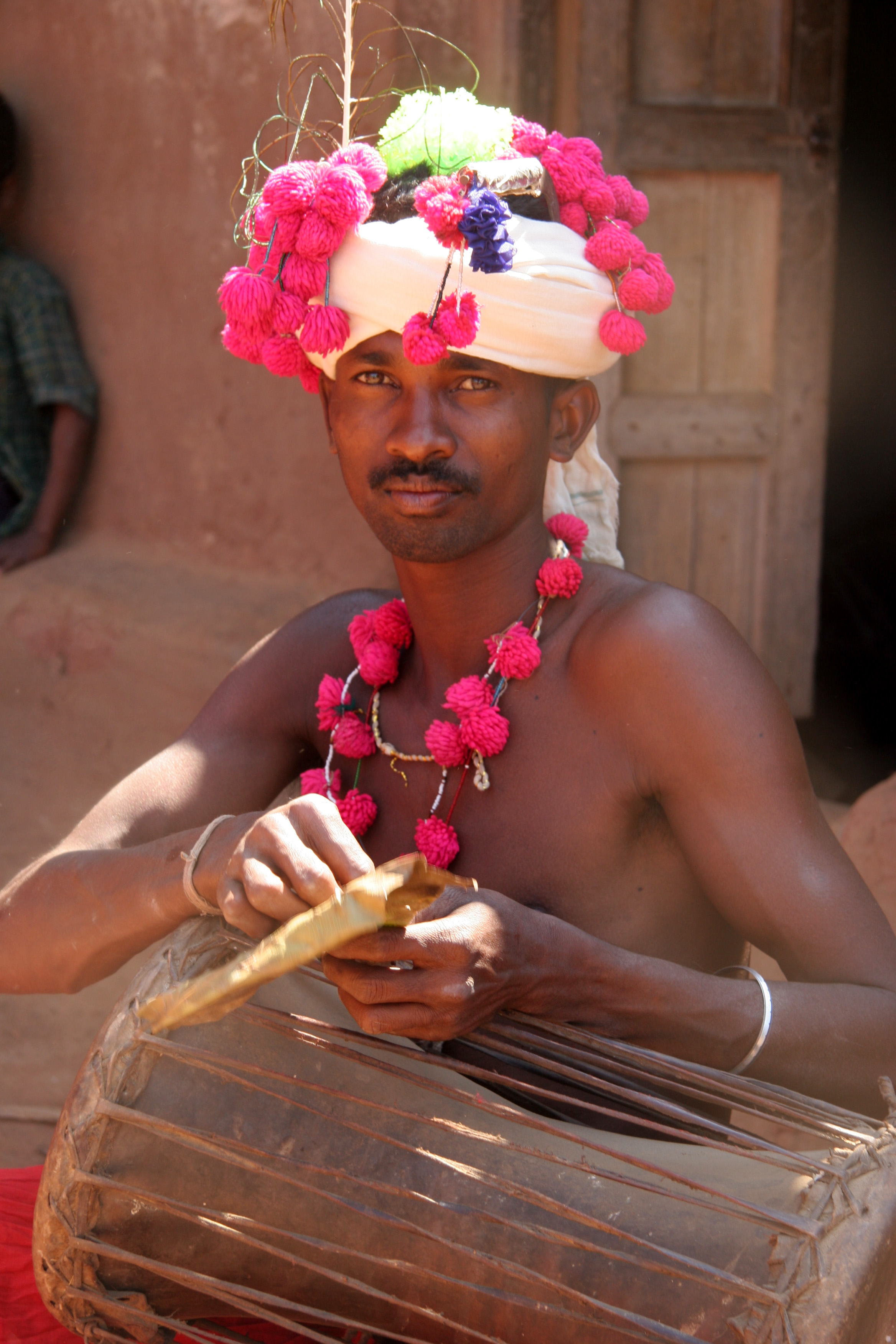 inde bastar homme muria en costume de danse